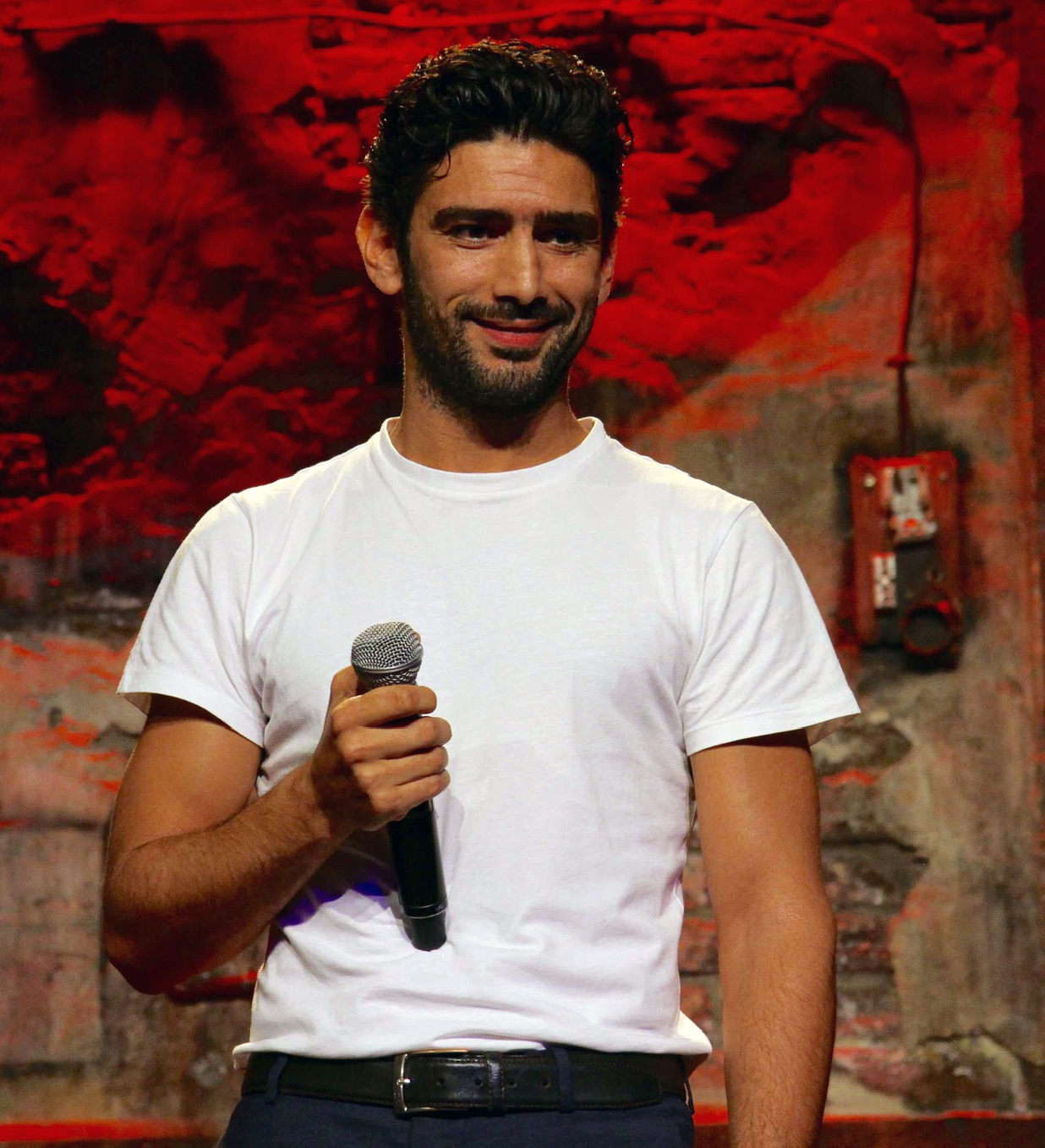 Salim Kechiouche au Comedy Club lors de la présentation de son court-métrage "Qu'est-ce qu'il y a ?"